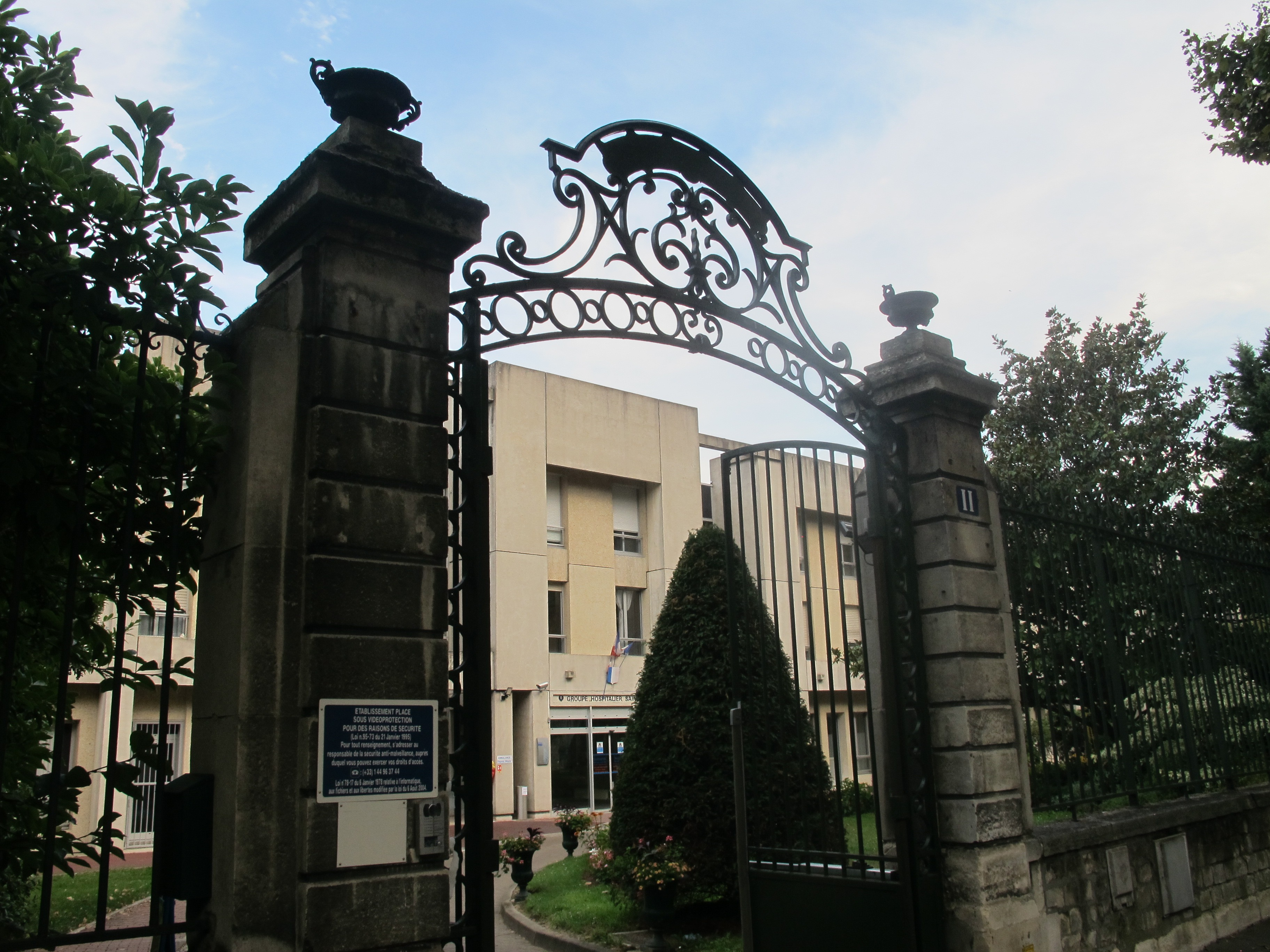 Hôpital Sainte-Périne, 11 rue Chardon-Lagache (Paris, 16e).